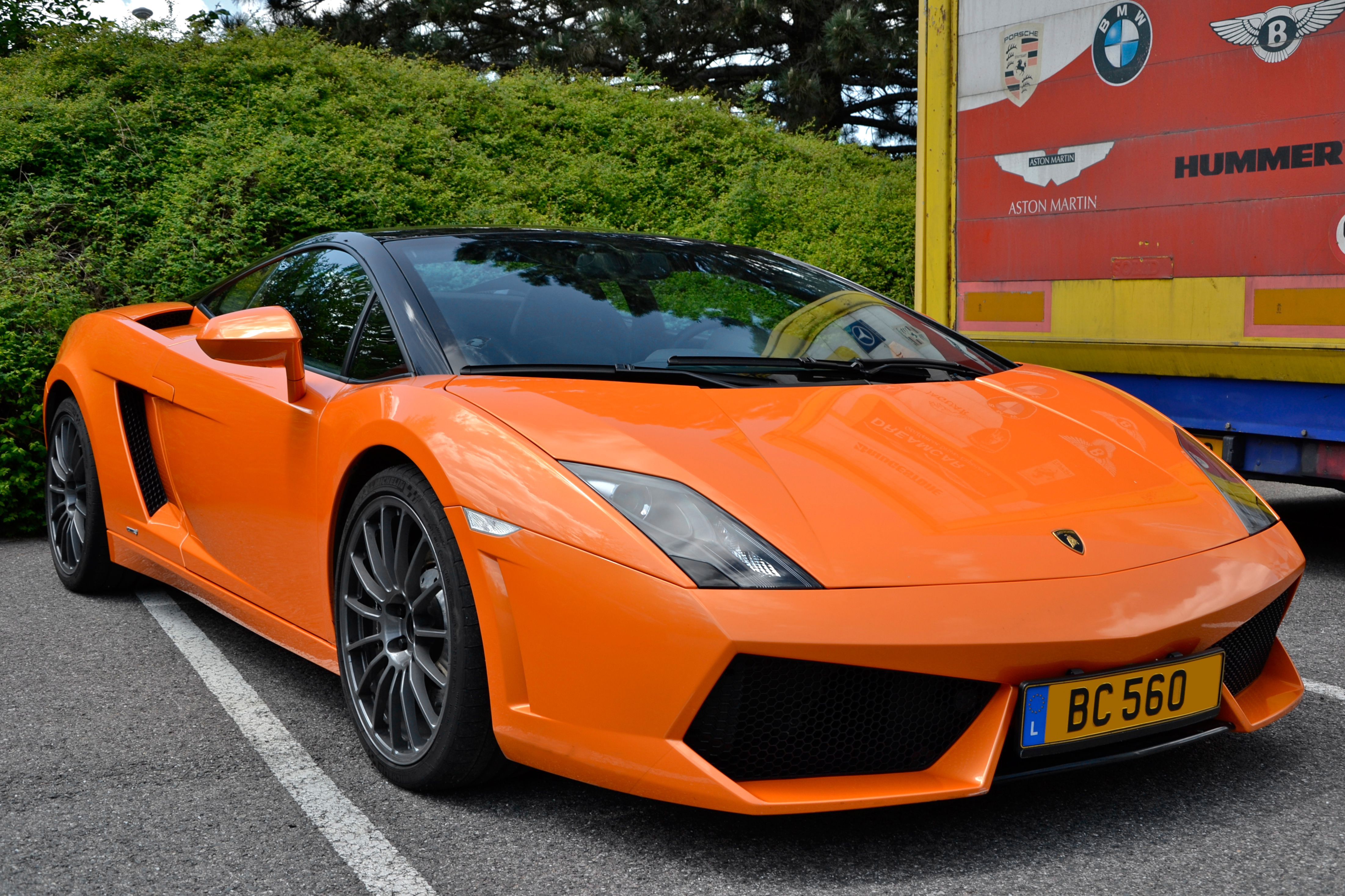 Lamborghini Gallardo LP 560-4 Bicolore